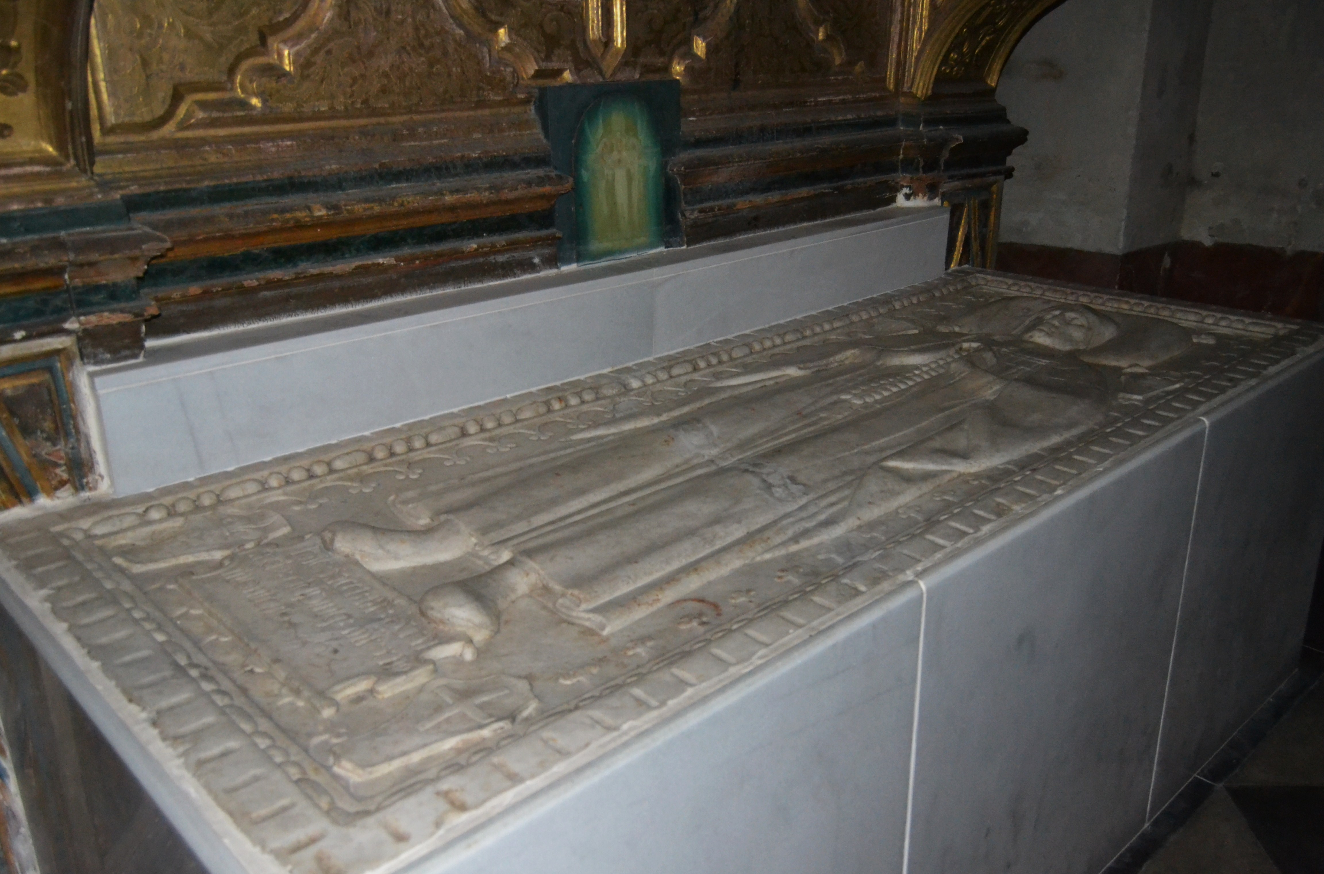 Lauda sepulcral de Bernat Despuig (1506-1537), mestre de l'Orde de Montesa, església del Temple de València. Procedeix del castell de Montesa.